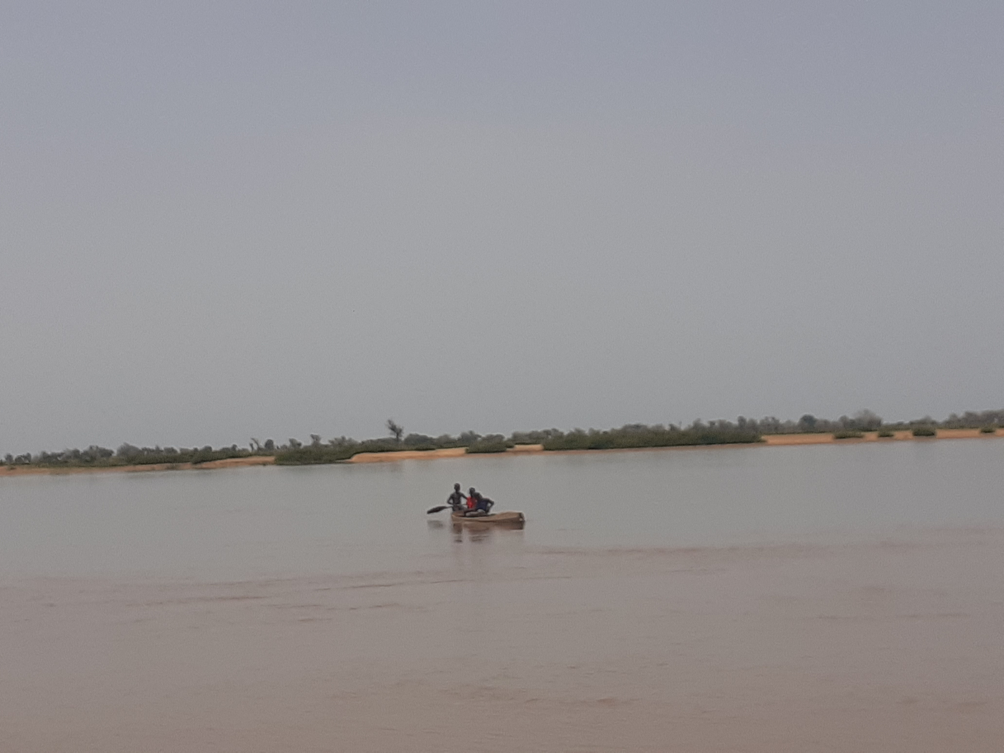 Pirogue en déplacement pour la rive opposée à Zébé Marao Cameroun